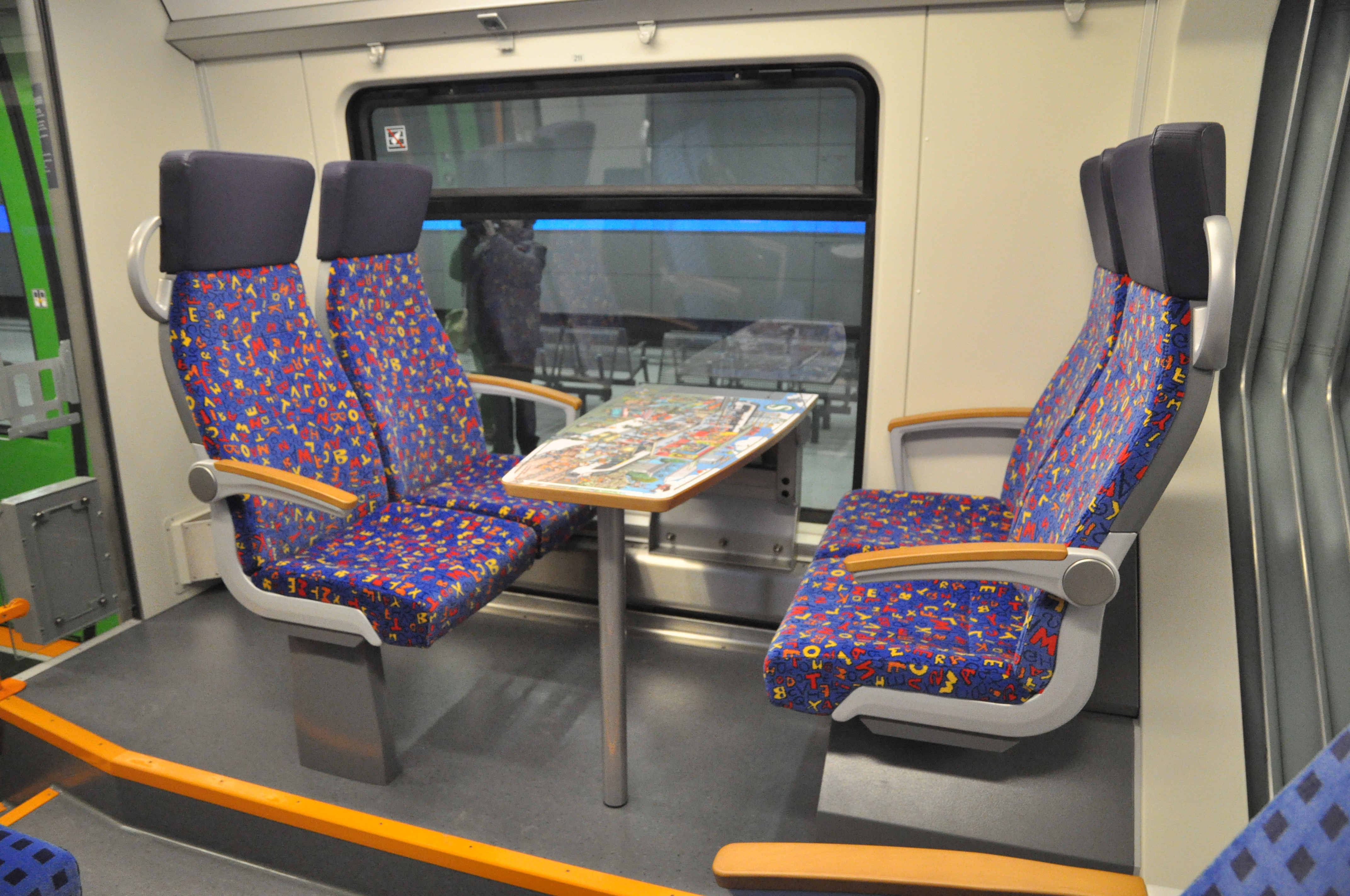 Familienbereich im Talent 2 (DB BR 1442) der S-Bahn Mitteldeutschland (Aufnahme im City-Tunnel Leipzig).